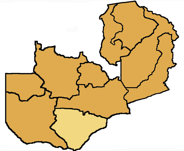 Mappa della diocesi di Monze, in Zambia. Lavoro personale, eseguito a partire da questa immagine di Commons. Fonte per i confini: Guida delle missioni cattoliche 2005, a cura della Congregatio pro gentium evangelizatione, Roma, Urbaniana University Press, 2005. Categoria:Chiesa cattolica in Zambia Categoria:Mappe dell'Africa